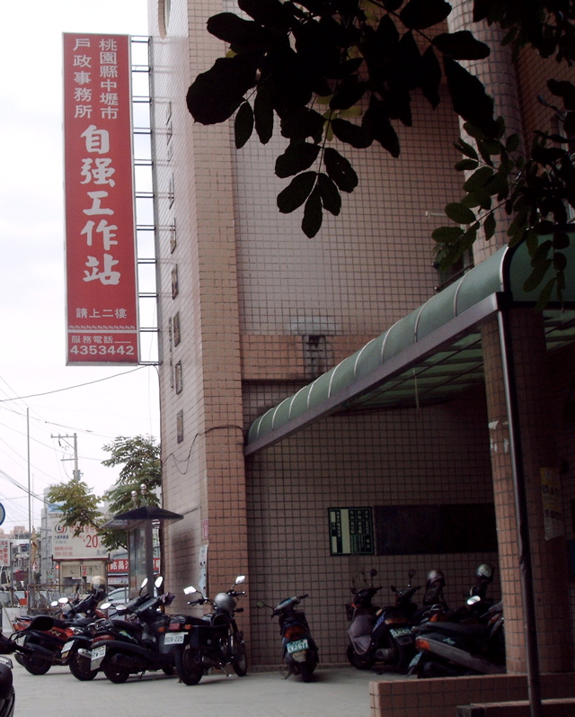 桃園縣中壢市戶政事務所自強工作站，位於桃園縣中壢市強國路46號2樓（桃園縣中壢市自強里集會所）。